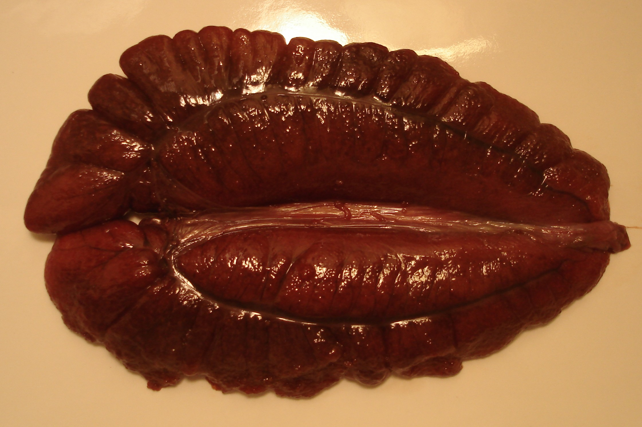 Shad roe